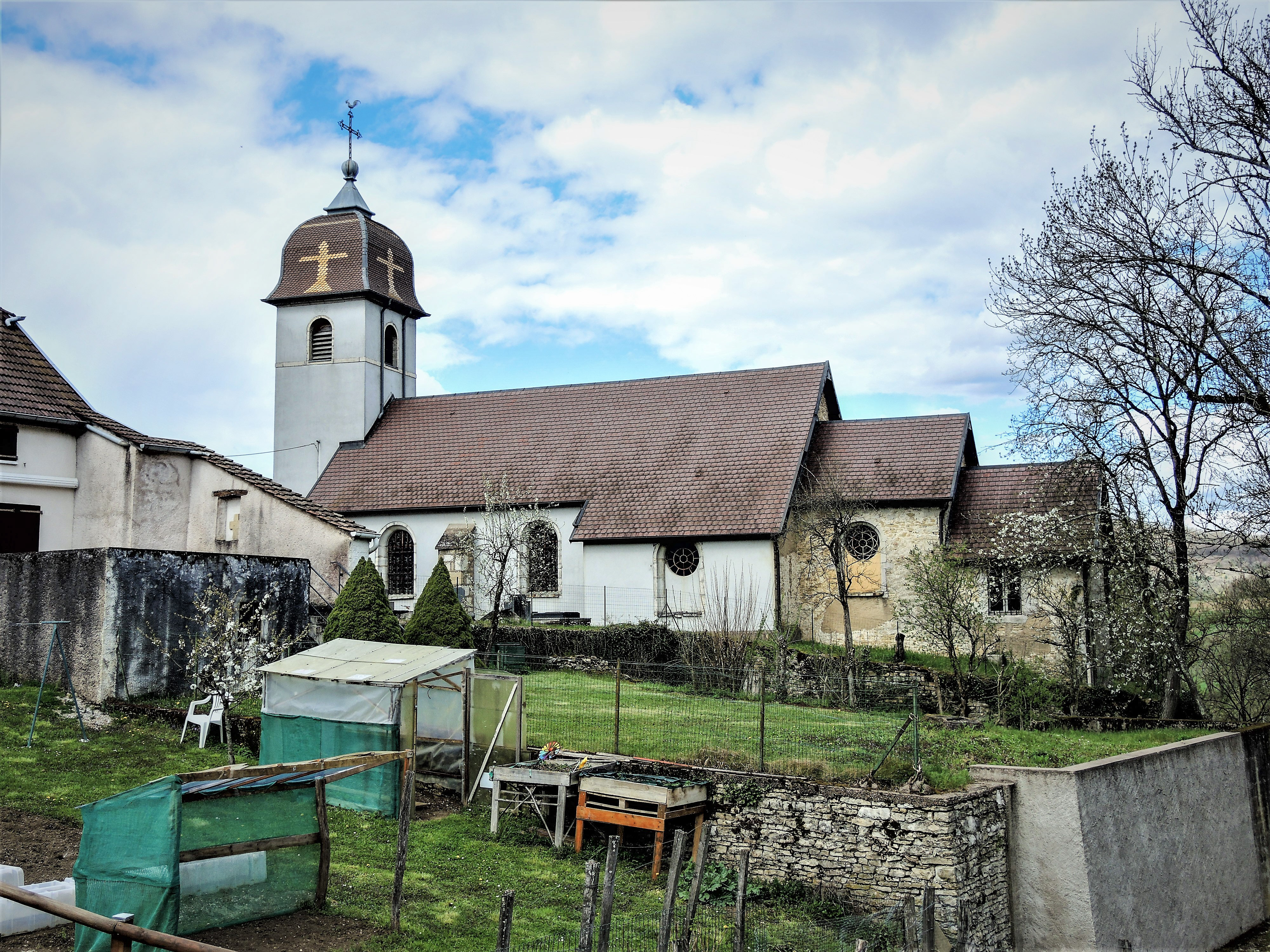 Eglise de Roche-lès-Clerval. Doubs